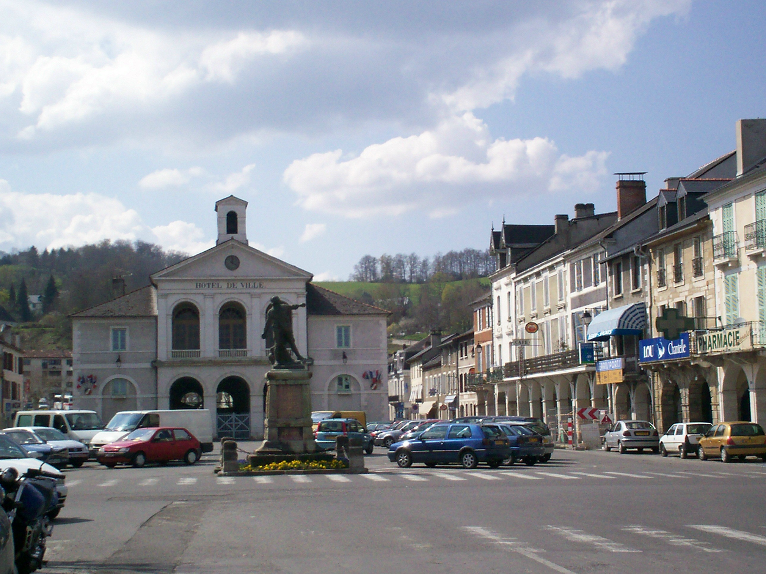 Nay, l'hôtel de ville